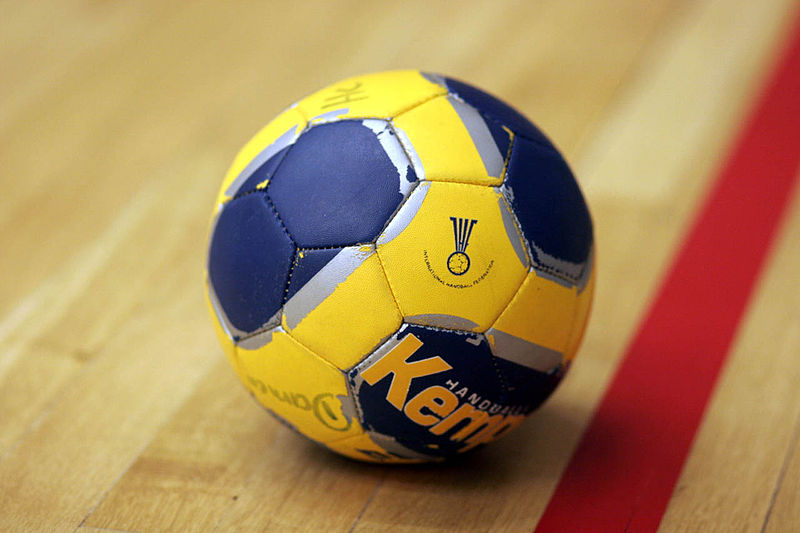 Гандбол